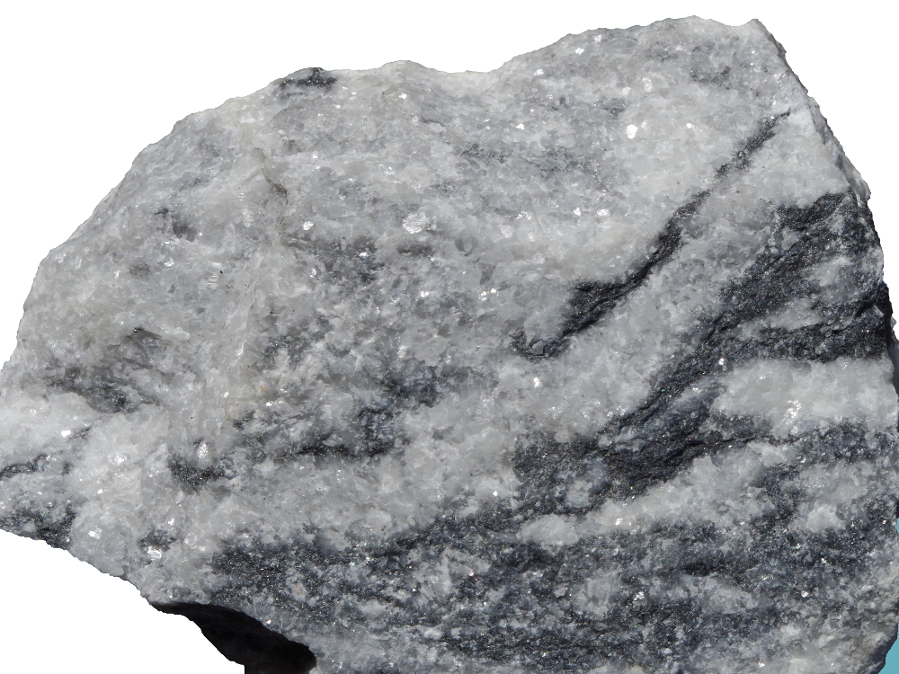 Vzorek pochází z lomu Skoupý u Petrovic. Skutečná šířka záběru je 12 cm.